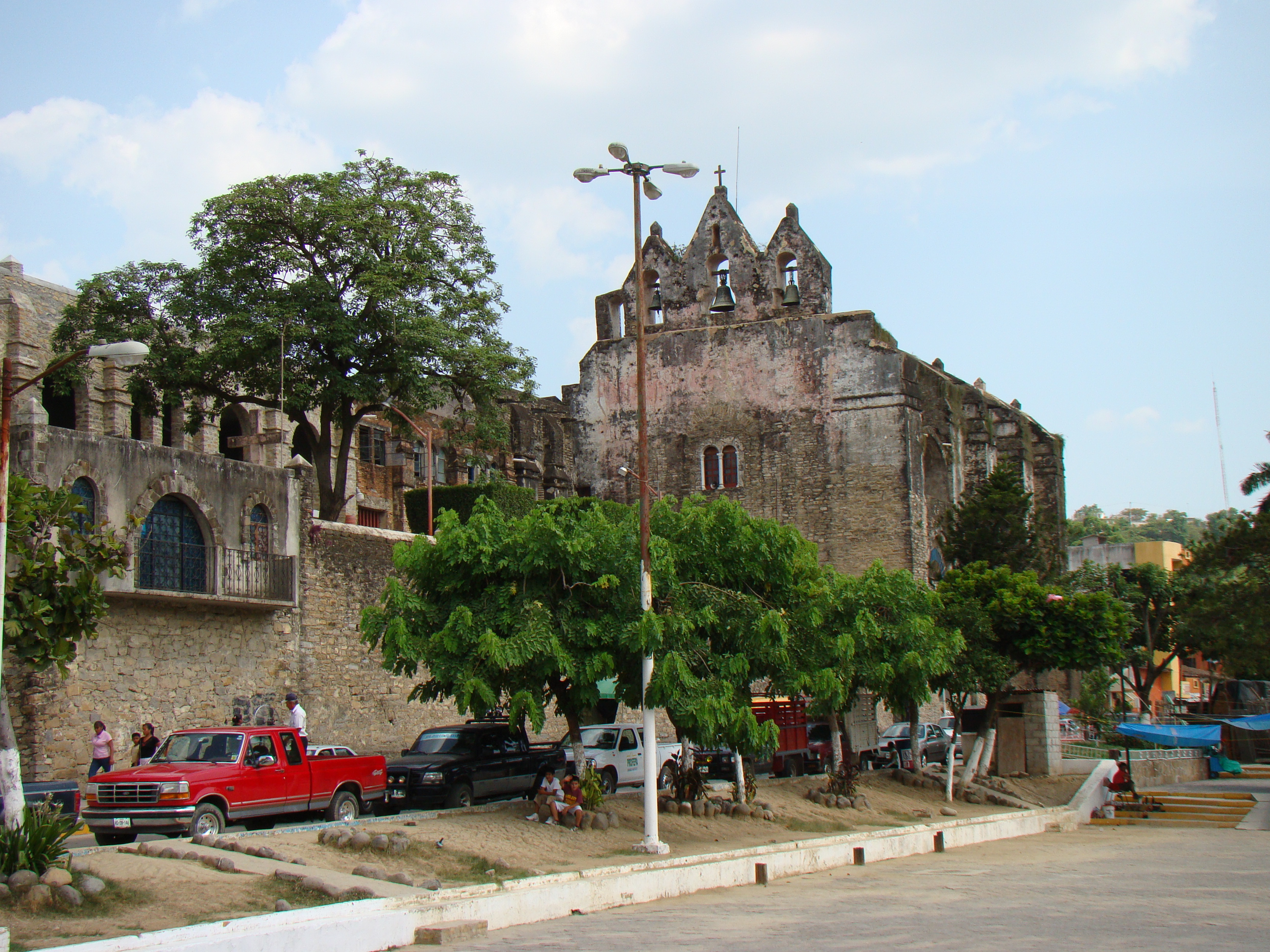 Iglesia de San Agustin ,Huejutla Hidalgo